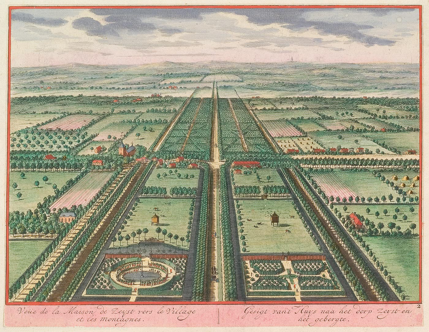 Gravure van het Slot te Zeist, Nederland